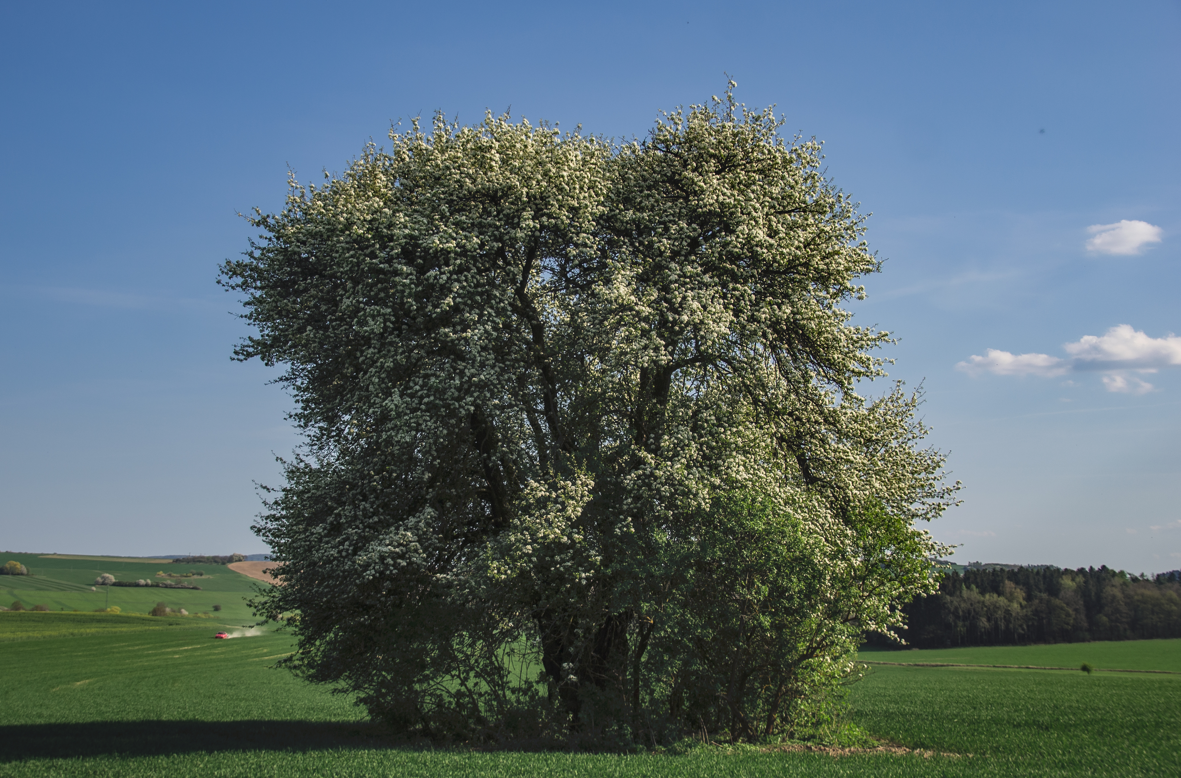 Rozkvetlá Niklojc hruška na jaře 2018